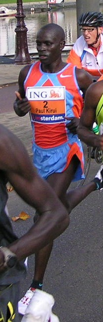 Paul Kirui tijdens de marathon van Amsterdam in 2007, waar hij als vierde zou finishen.